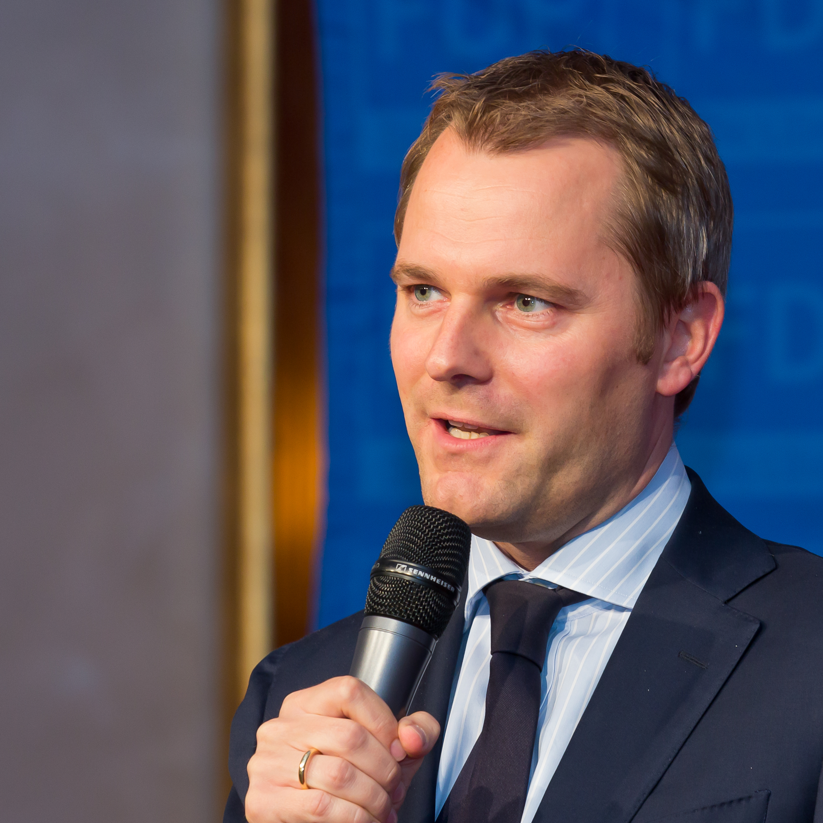 FDP-Wahlkampfkundgebung in der Wolkenburg Köln. Im Bild: Bundesgesundheitsminister Daniel Bahr